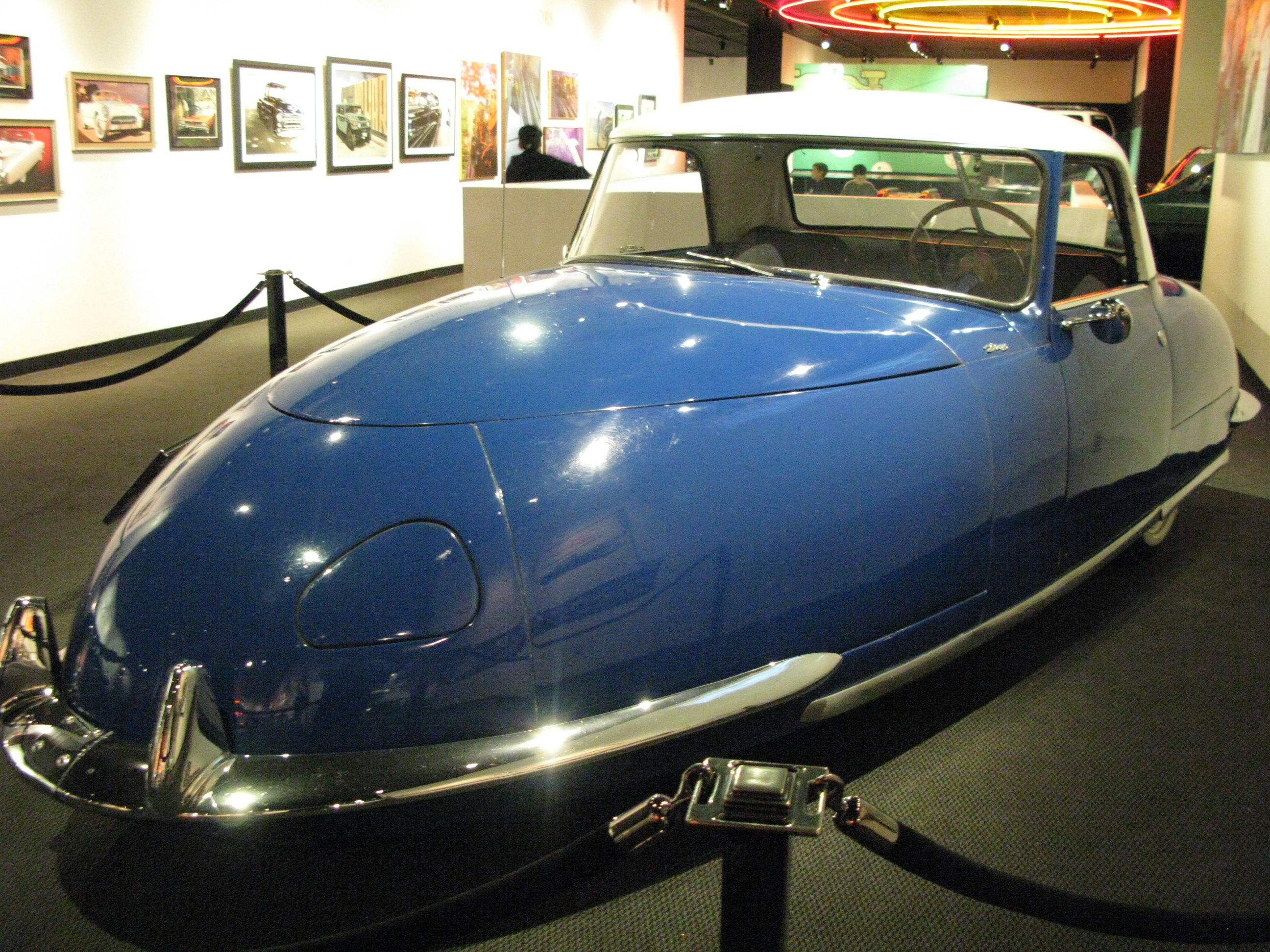 1948 Davis Divan